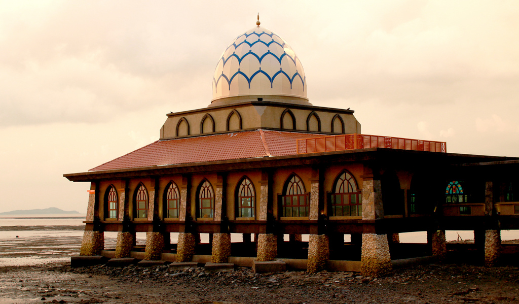 Masjid